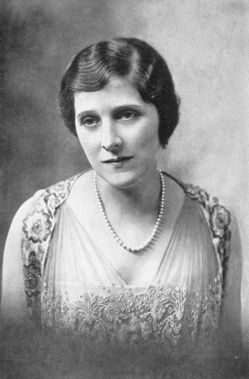 Edna May